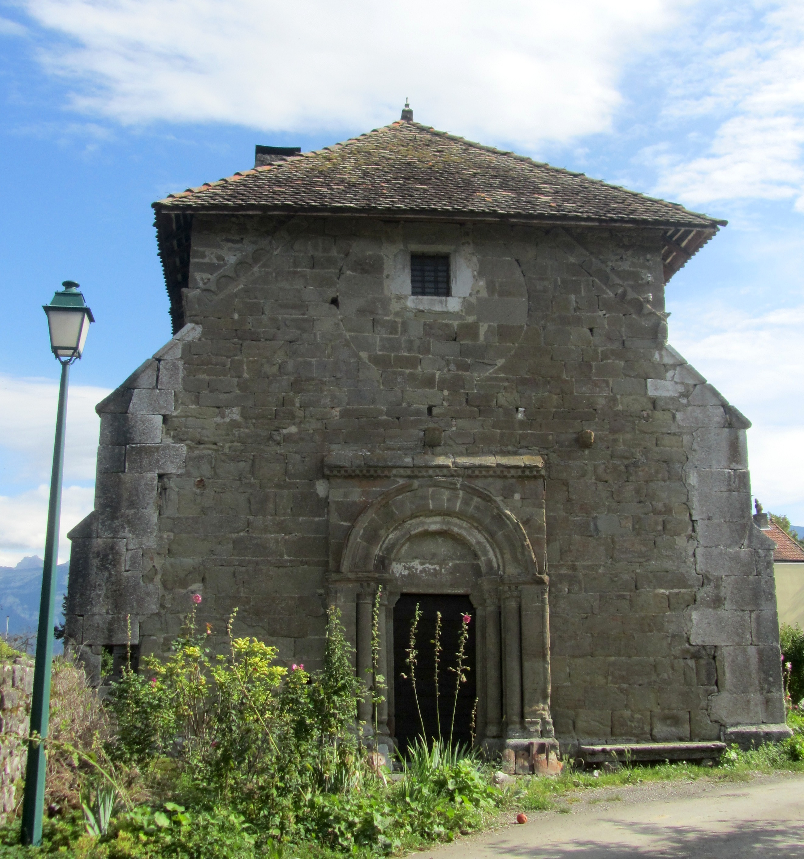 la Chapelle de Moussy, près de Cornier (Haute-Savoie)